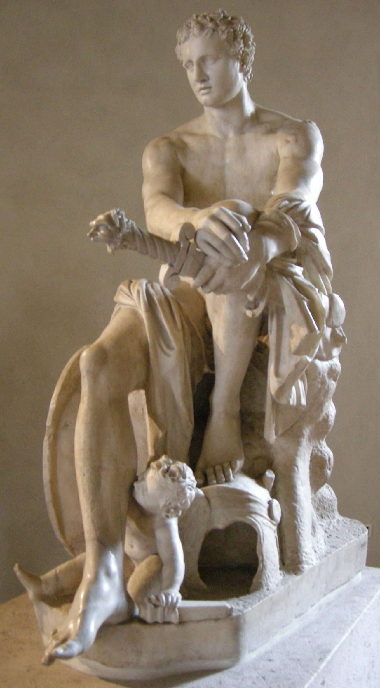 Ludovisi Ares